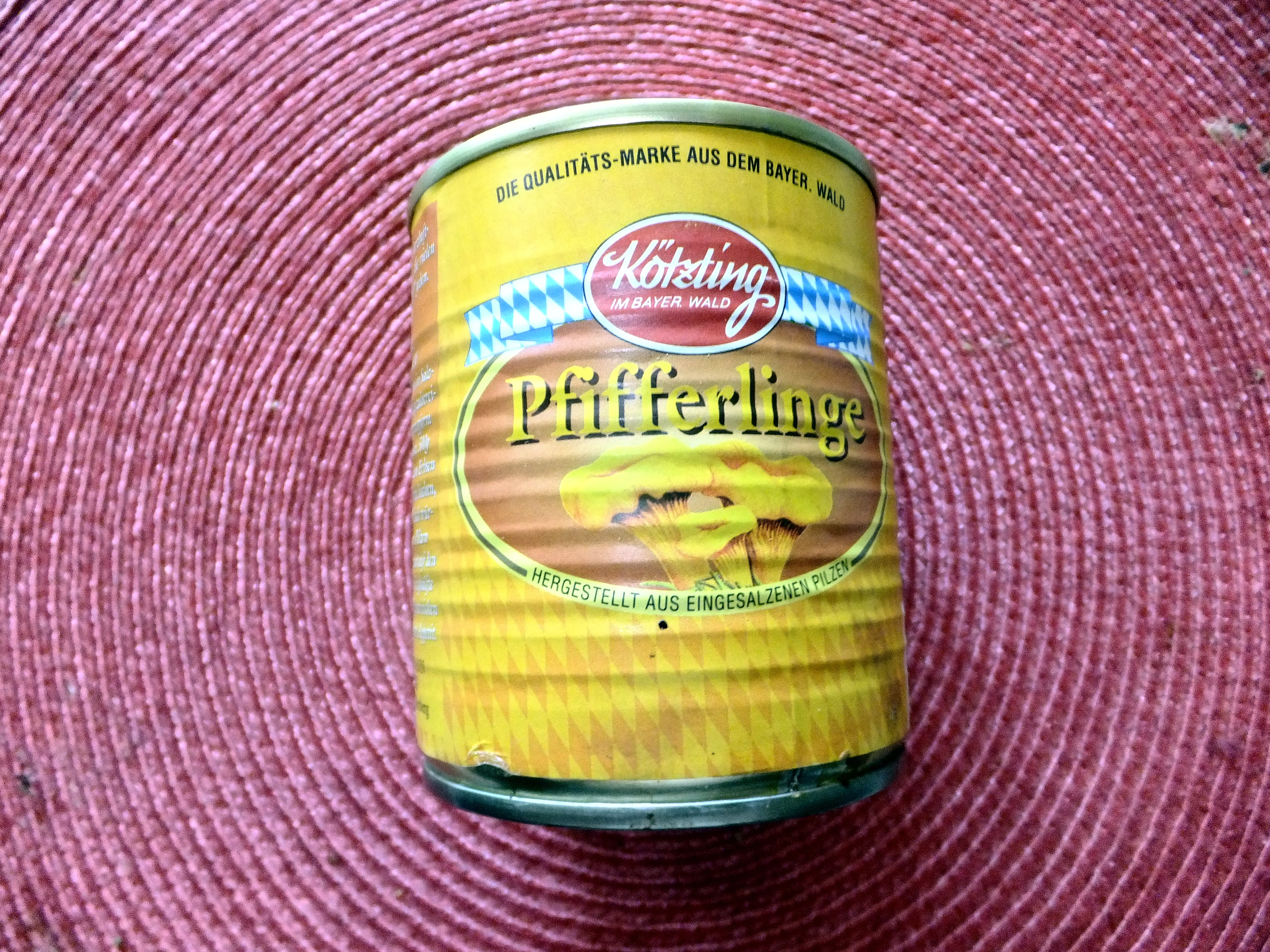 Pfifferlinge 3, Konserve